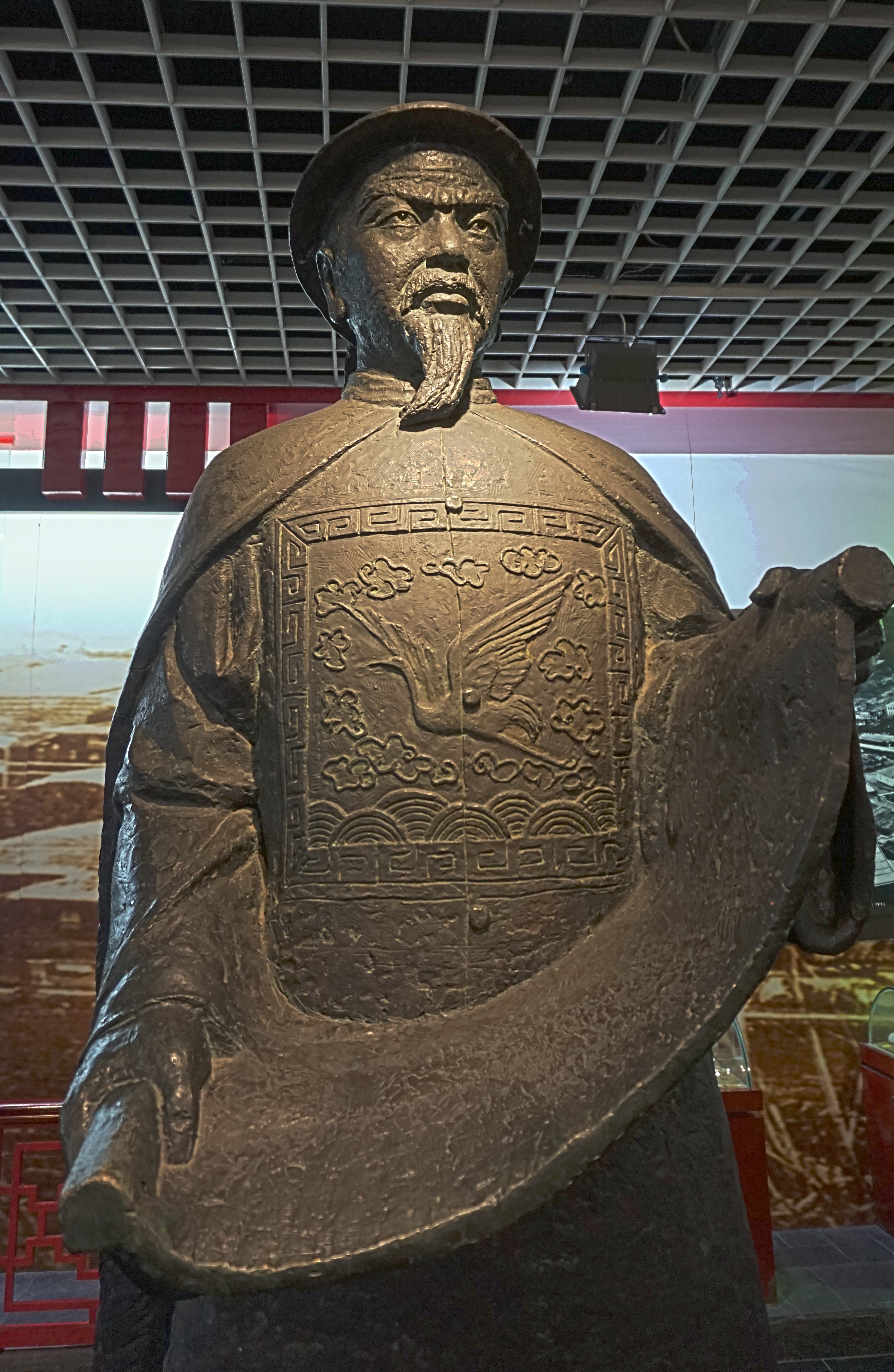 沈葆桢铜像。